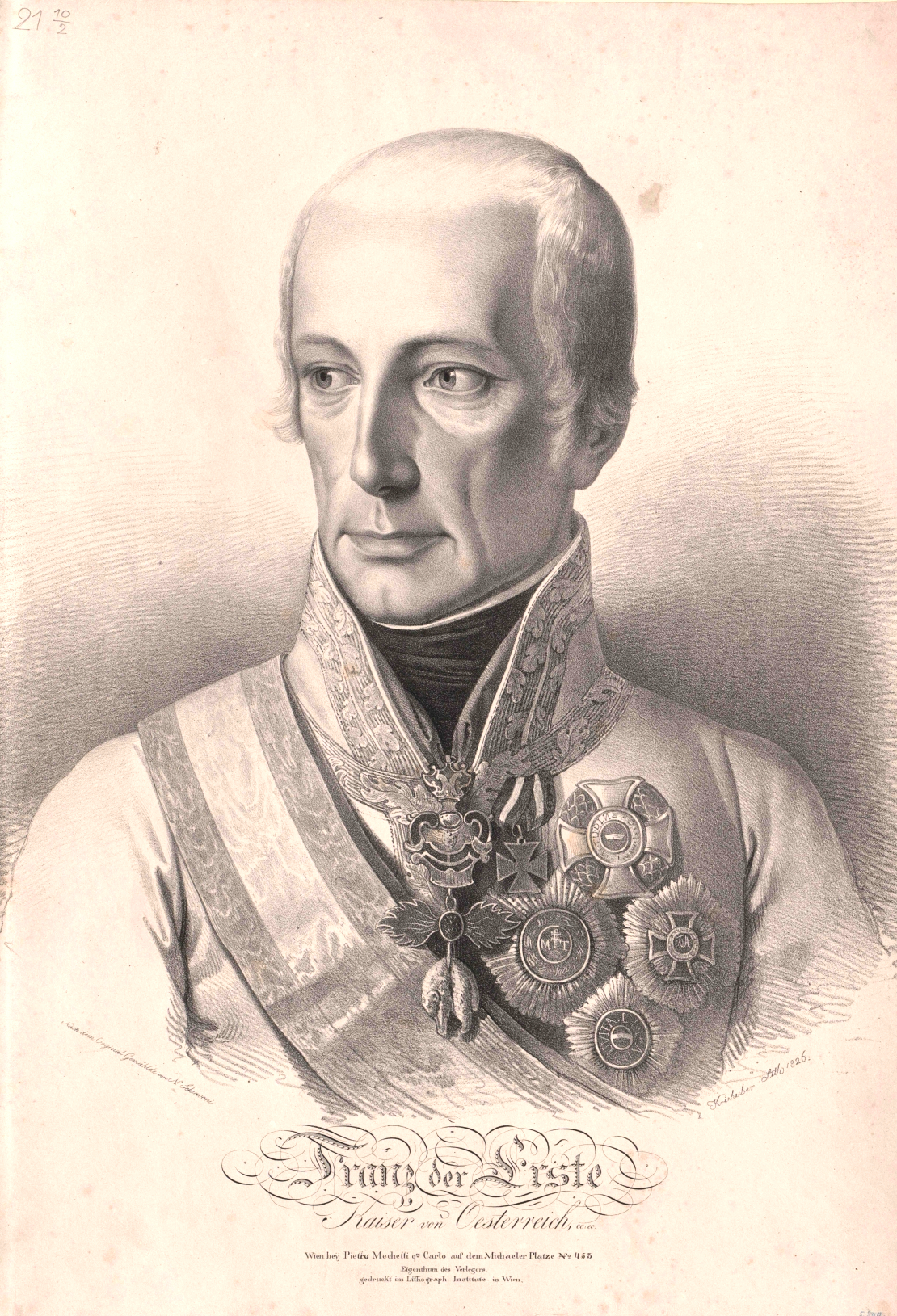 Franz II., römisch-deutscher Kaiser (1768 - 1835)